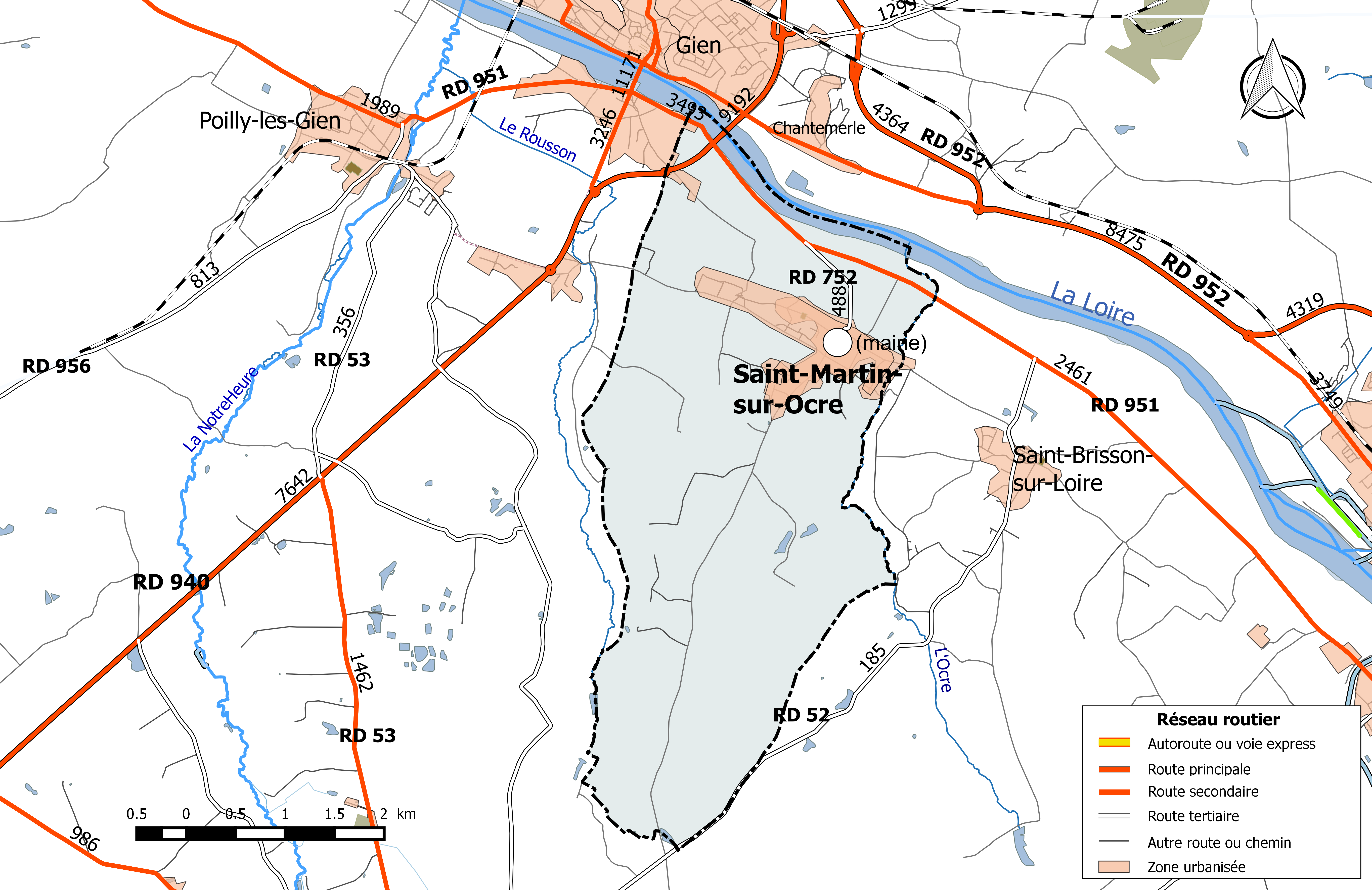 Carte du réseau routier de la commune de Saint-Martin-sur-Ocre (Loiret).